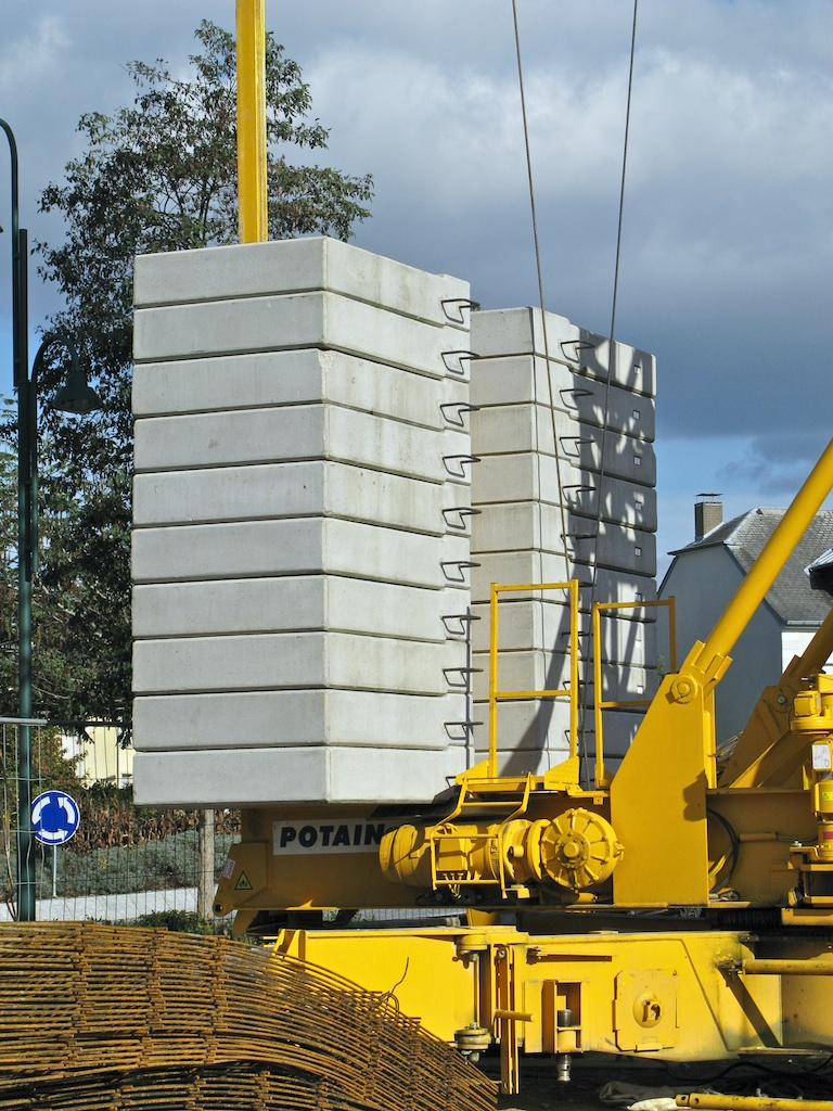 Kontergewiicht un engem Baukran.